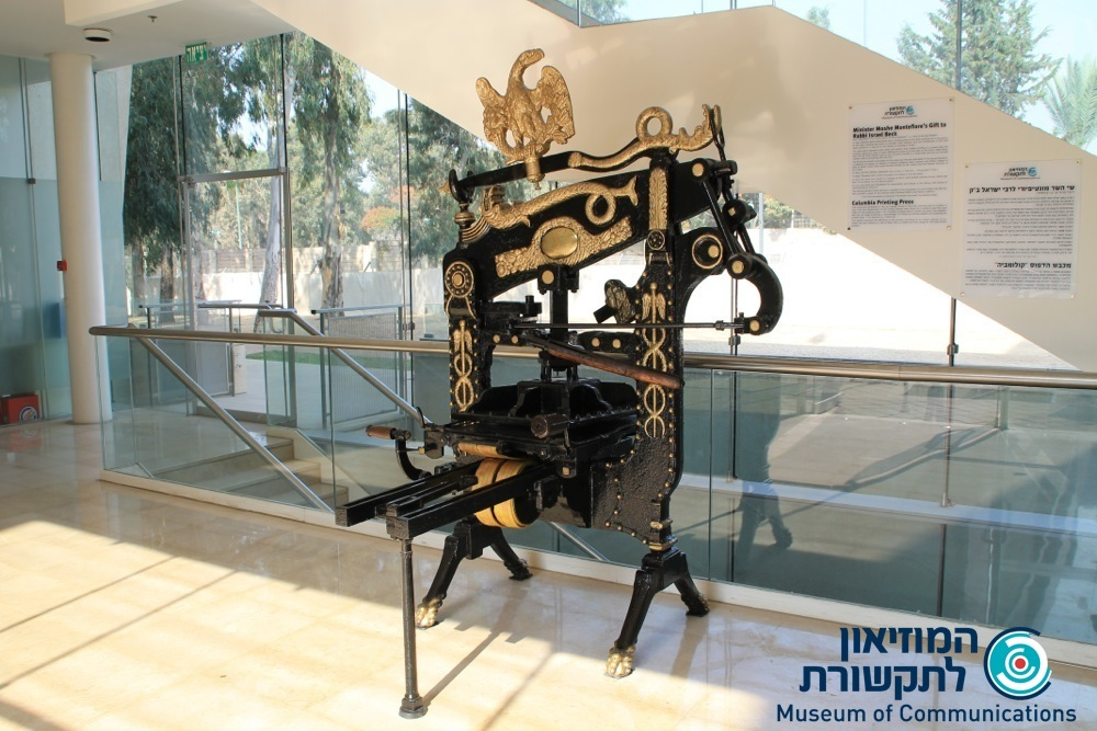 מכבש הדפוס הראשון בירושלים מתנת משה מונטיפיורי לרבי ישראל ב"ק מתוך המוזיאון לתקשורת, ביה"ס סמי עופר לתקשורת, הבינתחומי הרצליה